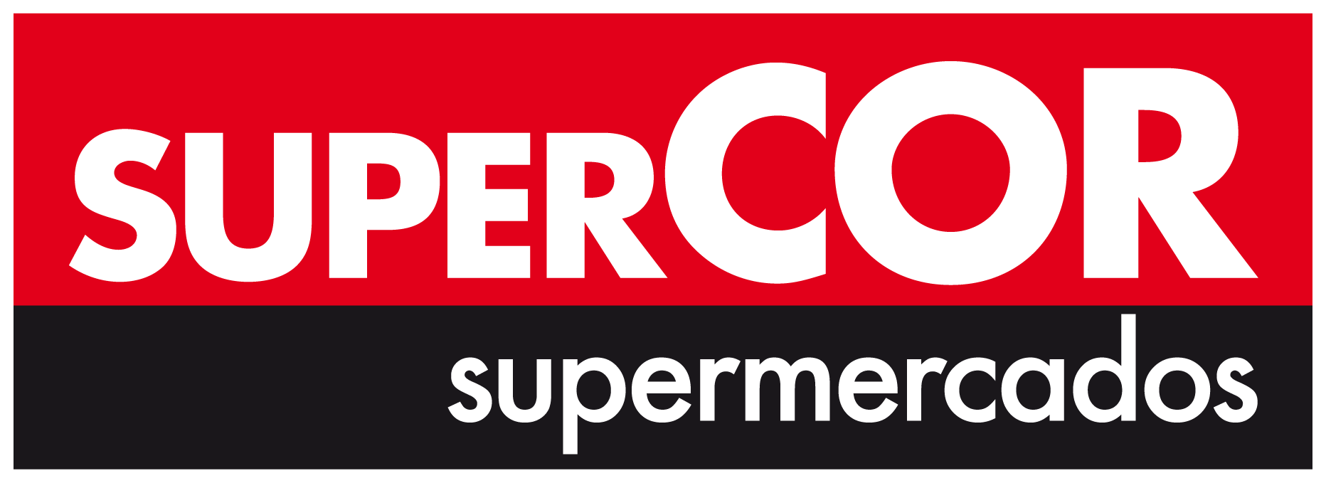 Logo de Supercor.